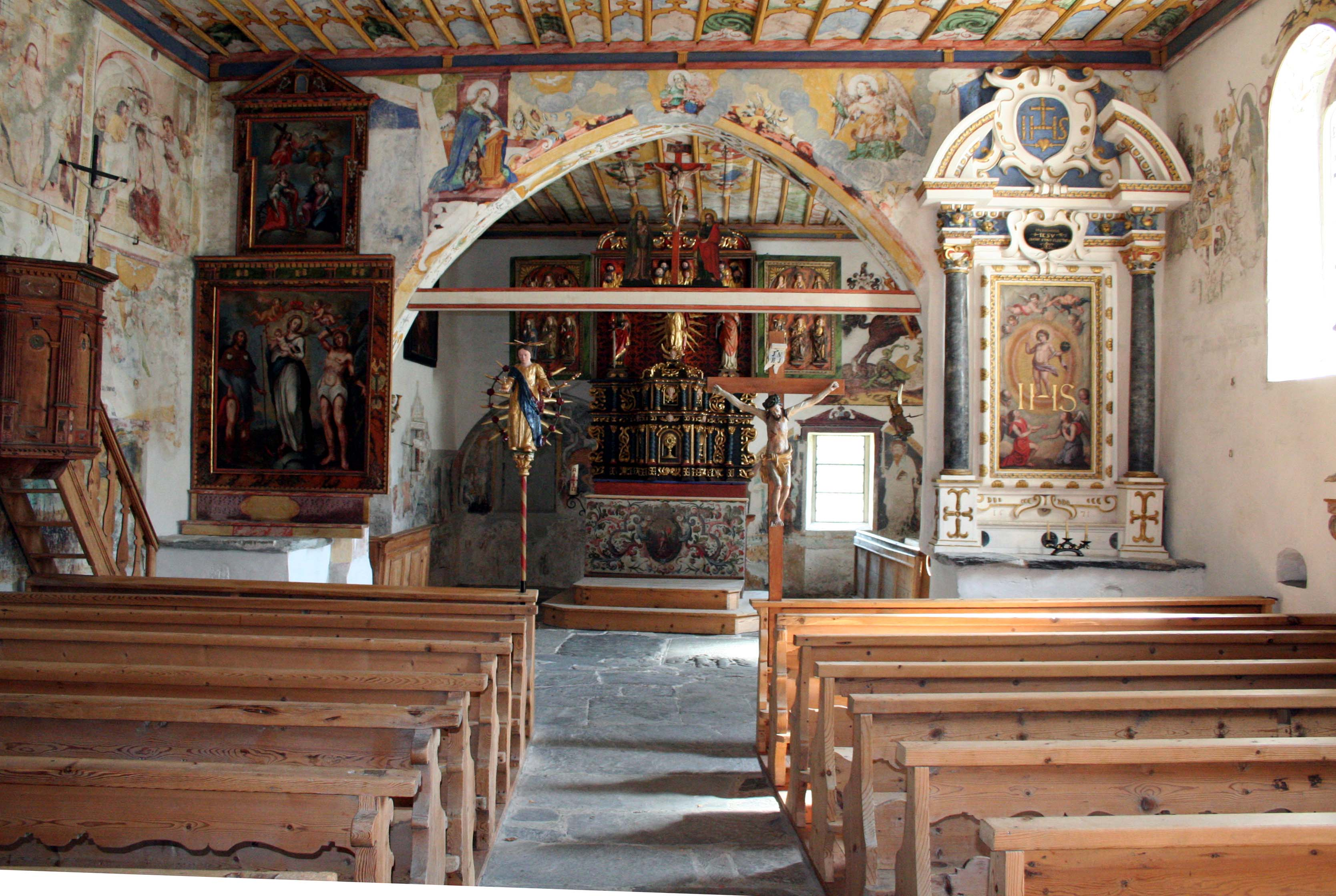 Innenraum